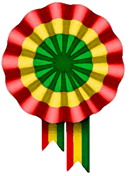 Escarapela de Bolivia